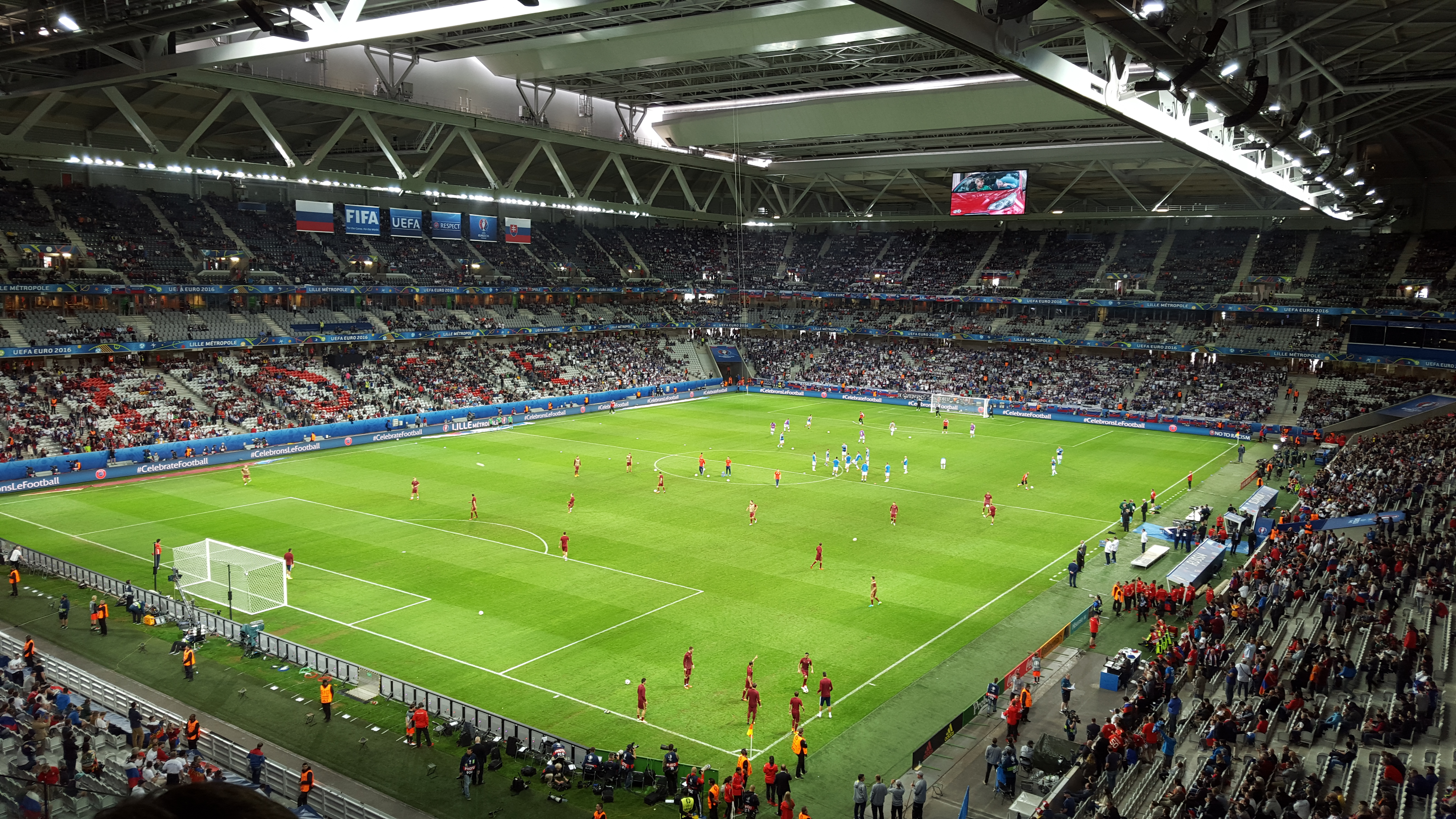 Échauffements des équipes avant la rencontre Russie-Slovaquie, comptant pour le championnat d'Europe de football 2016, au Stade Pierre-Mauroy de Villeneuve d'Ascq, le 15 juin 2016.